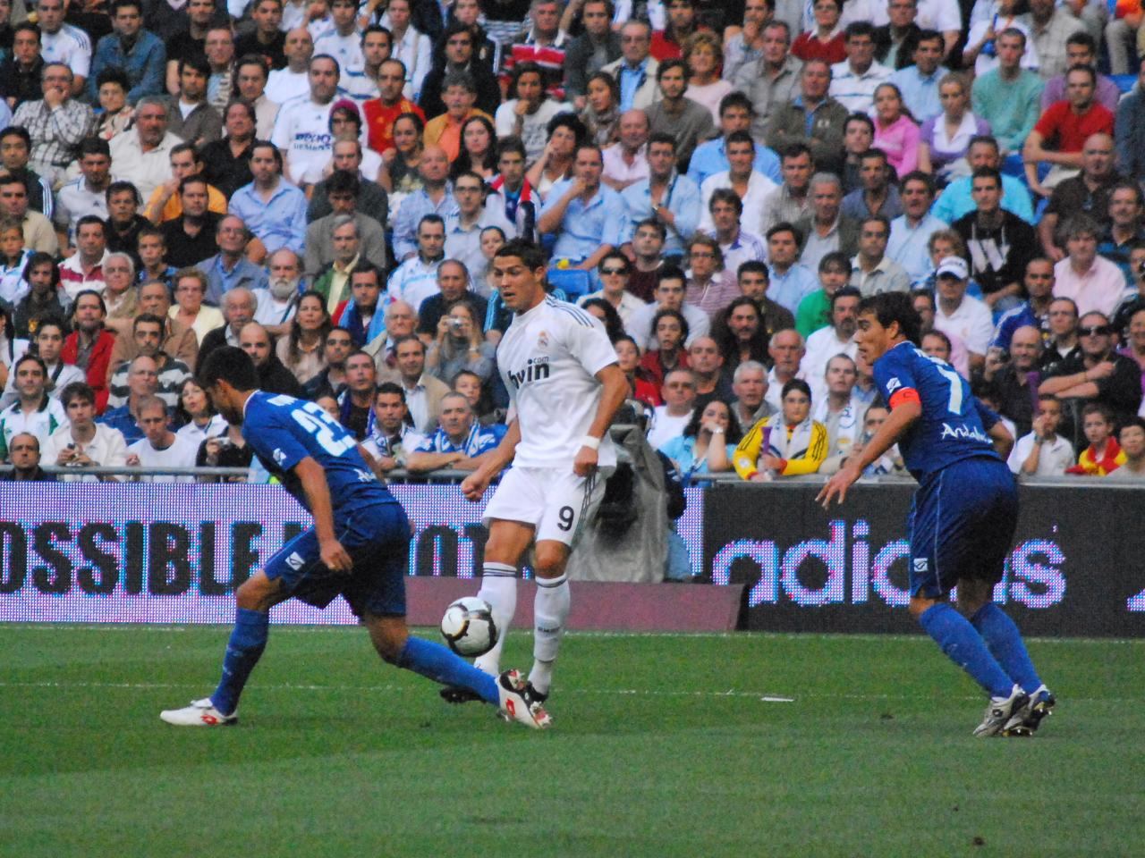 Real Madrid 5 - Xerez 0 20/9/09